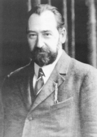 Оскар Вальдгауэр